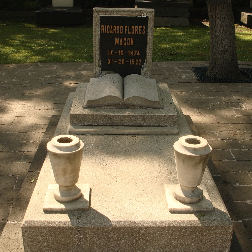 Tumba de Ricardo Flores Magón en la Rotonda de los Hombres Ilustres del Panteón Civil de Dolores en la Ciudad de México.